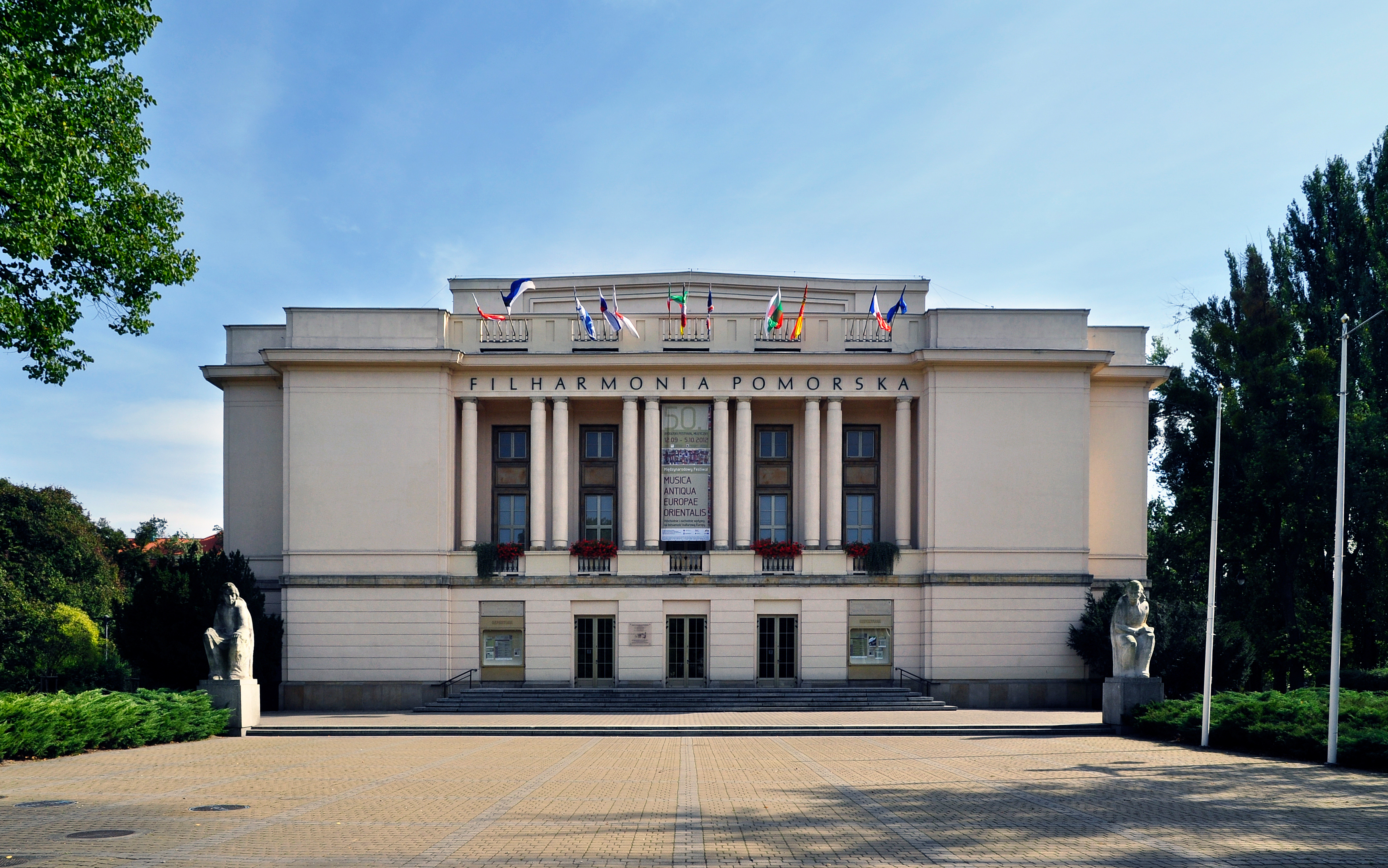 Filharmonia Pomorska, 1954-1958 Bydgoszcz, ul. Libelta 16